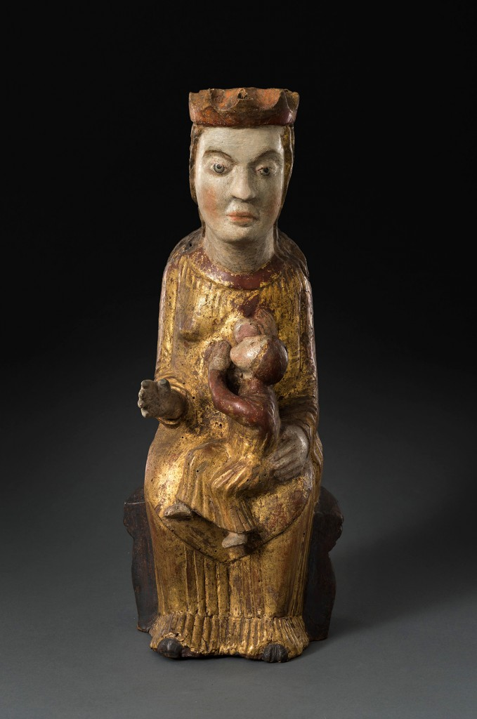 Statue St. Maria, Ainhofen Lkr. Dachau, um 1120.